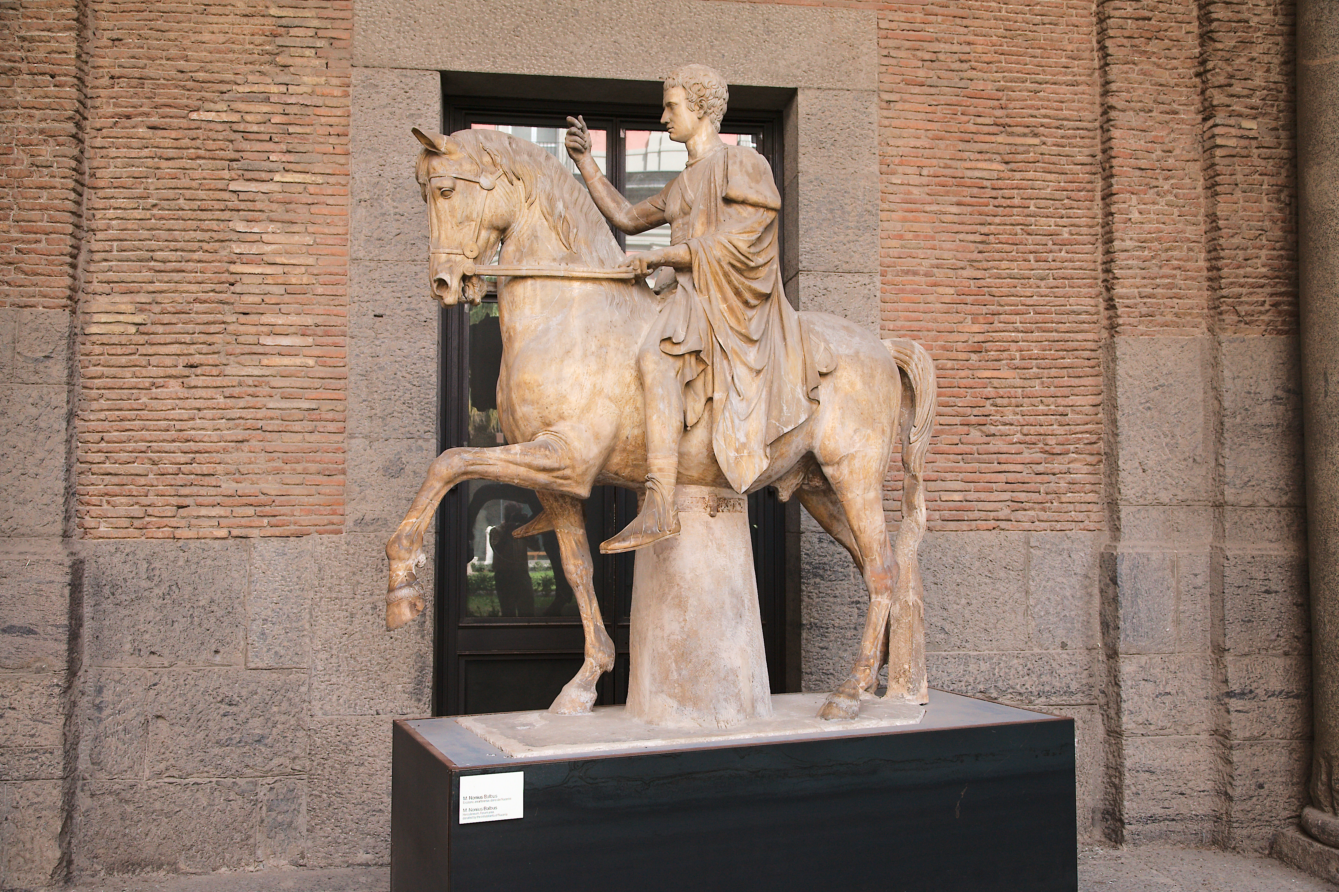 Statua equestre di Marcus Nonius Balbus giovane, omaggio degli Ercolanesi. Museo Archeologico Nazionale di Napoli (inv. 6104).